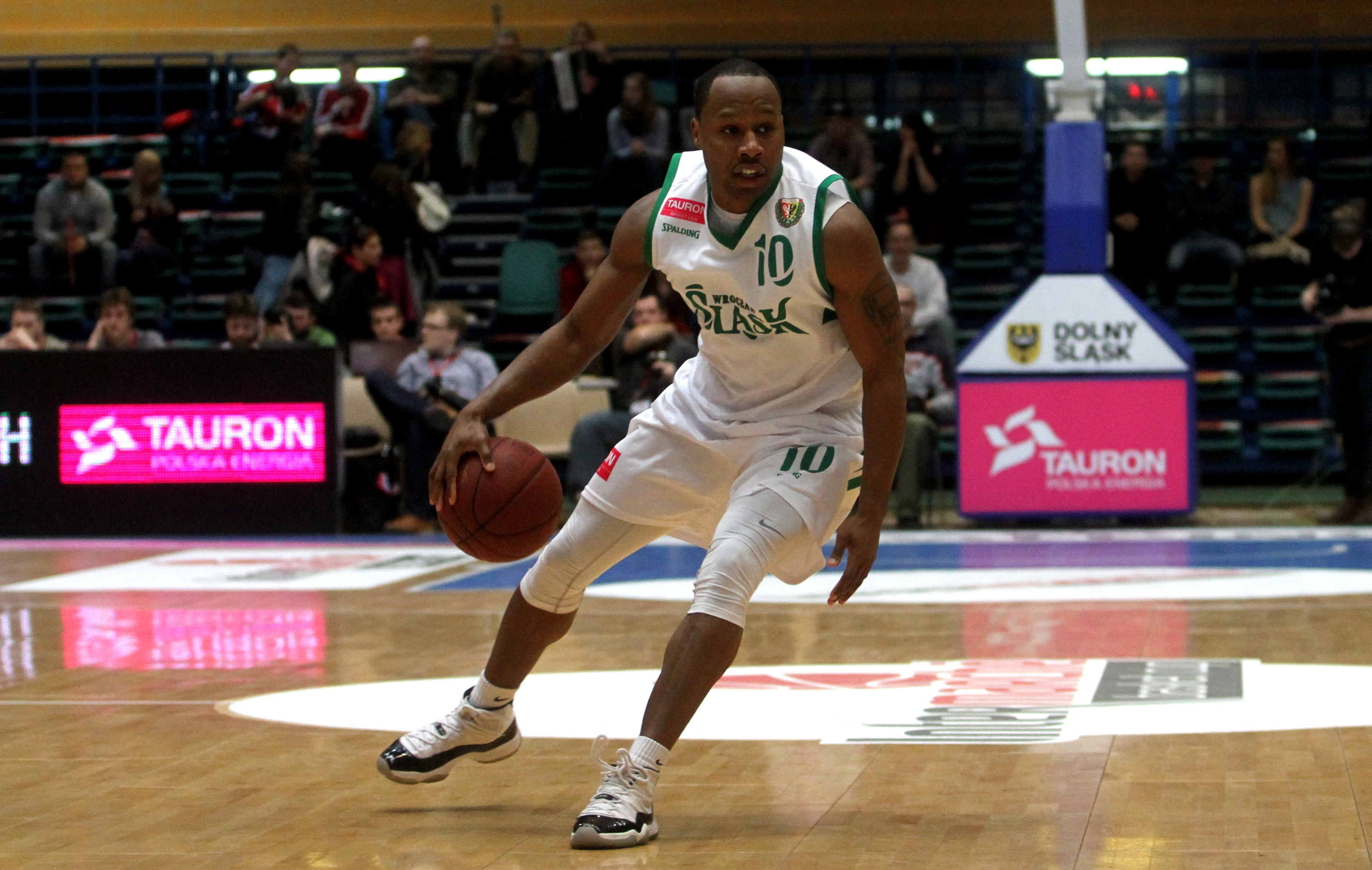 Danny Gibson, Śląsk Wrocław